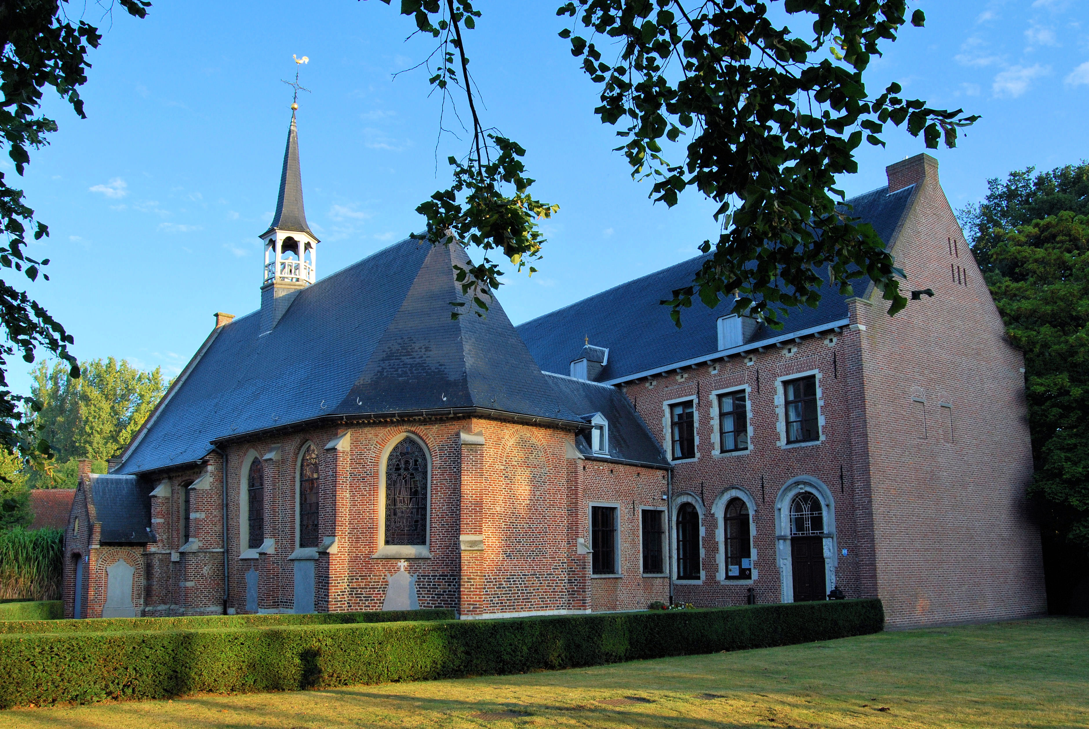 Ziekenhuis Sint-Elisabeth, het oud gasthuis aan de Kleine Nete is een van de twee plekken waar de Stad Herentals ontstond